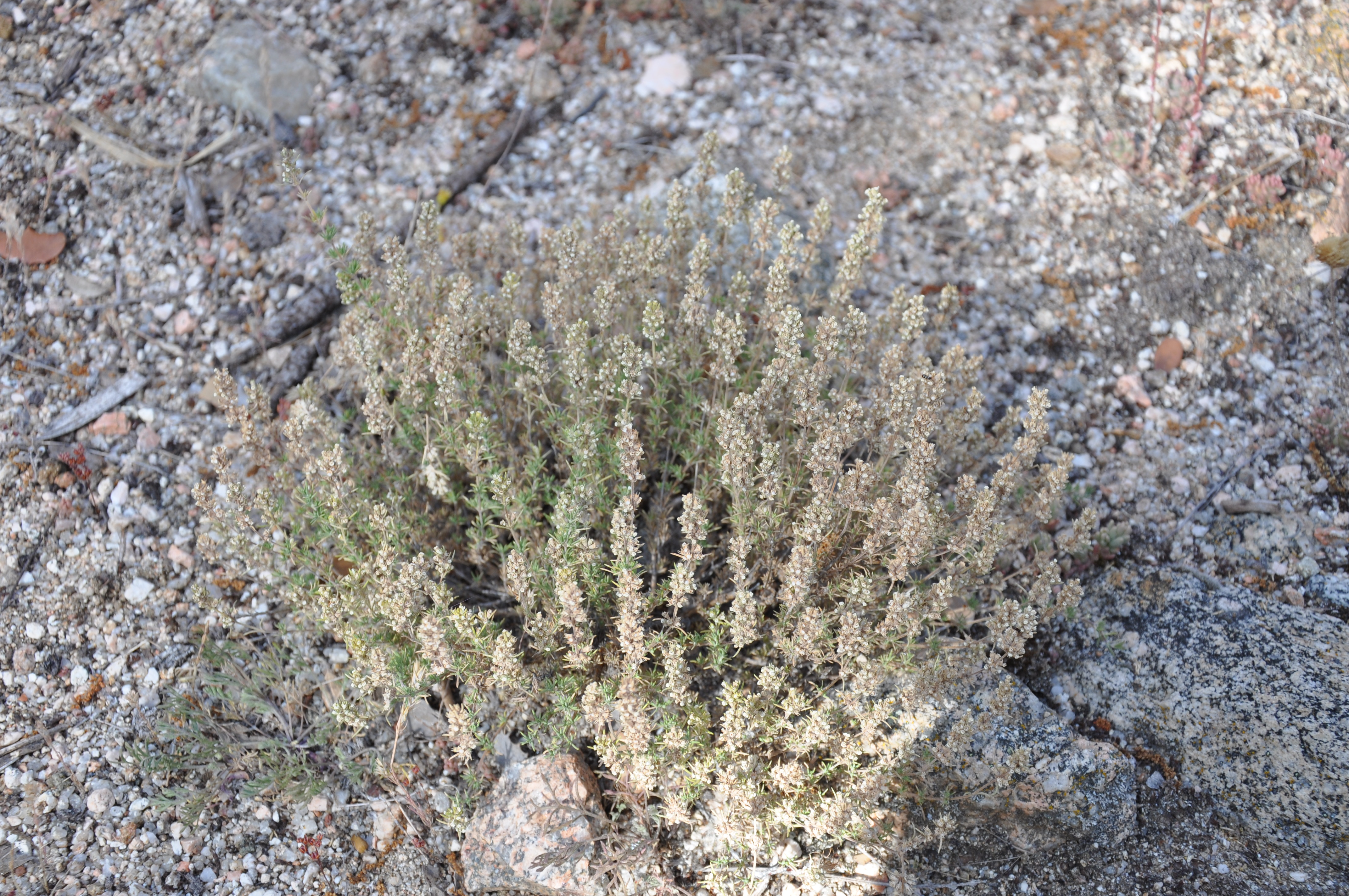 Tomillo salsero (Thymus zygis) en Guareña, La Torre, Ávila, España.